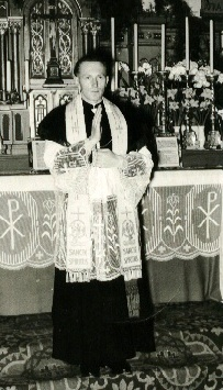 Pater Waldemar Regele bei seiner Primiz 1956